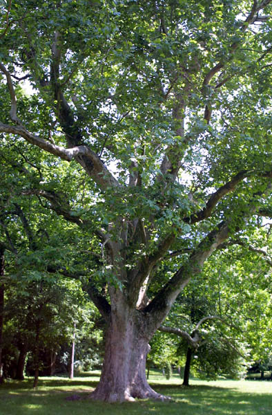 Platan ve Skalici